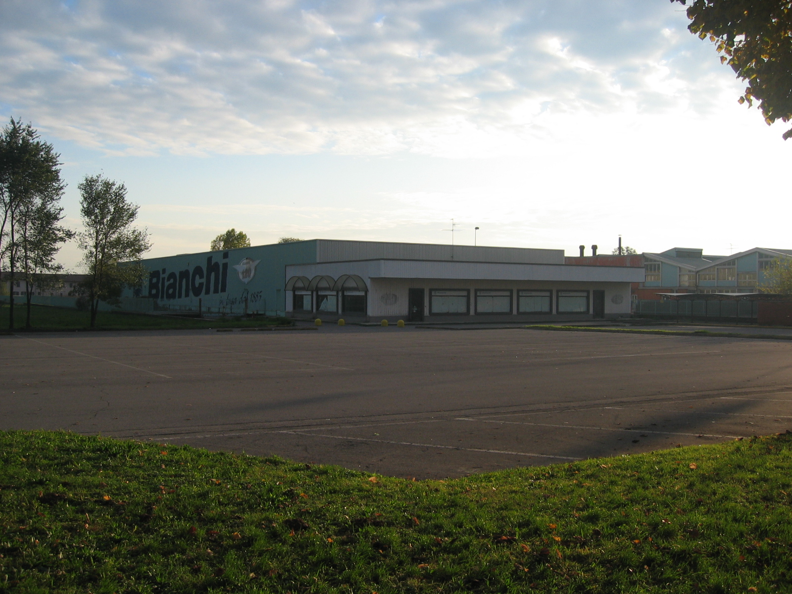 L'outlet della Bianchi.